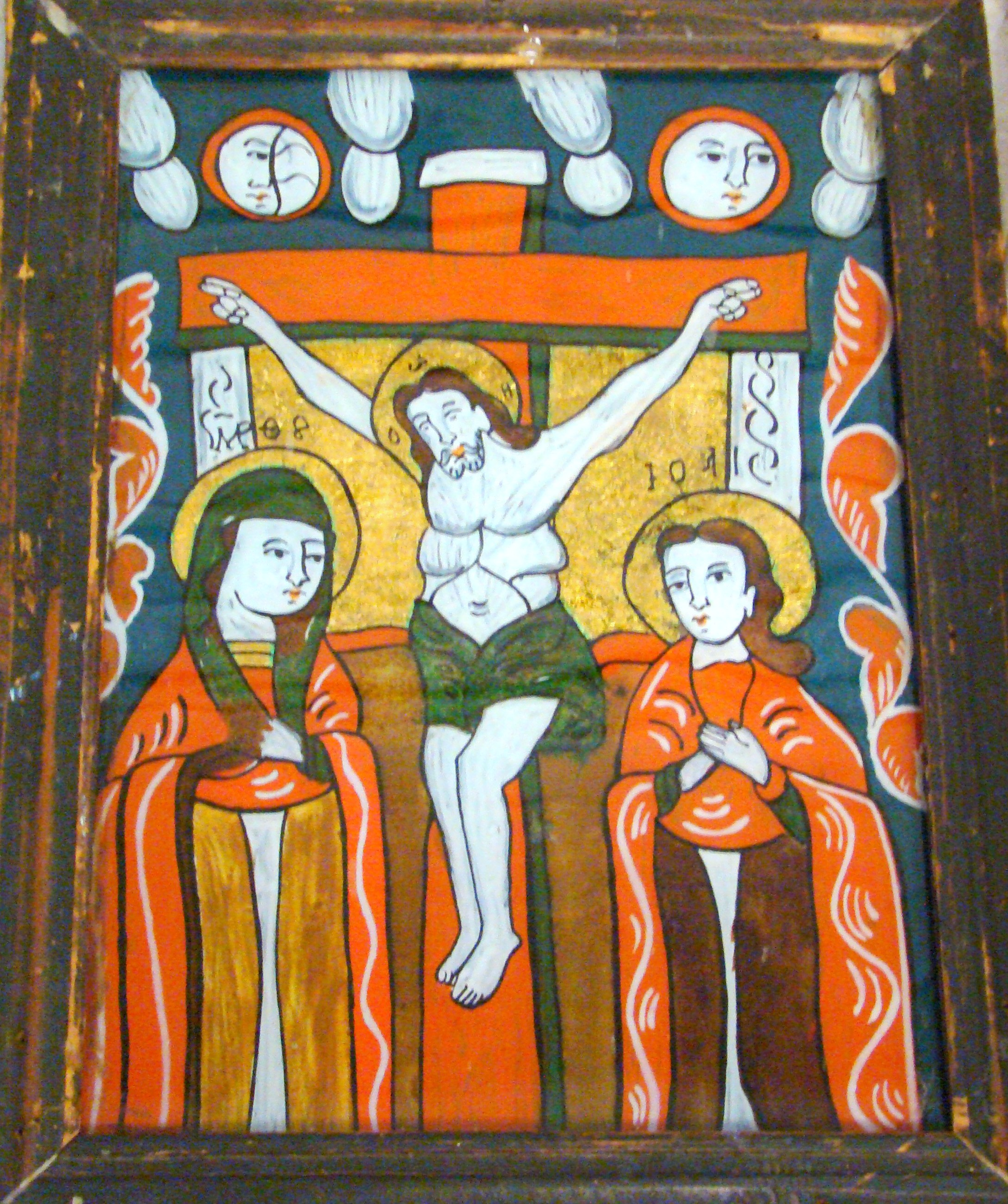 Biserica de lemn "Sfinții Arhangheli Mihail şi Gavril", sat PLOPIŞ; comuna ŞIŞEŞTI